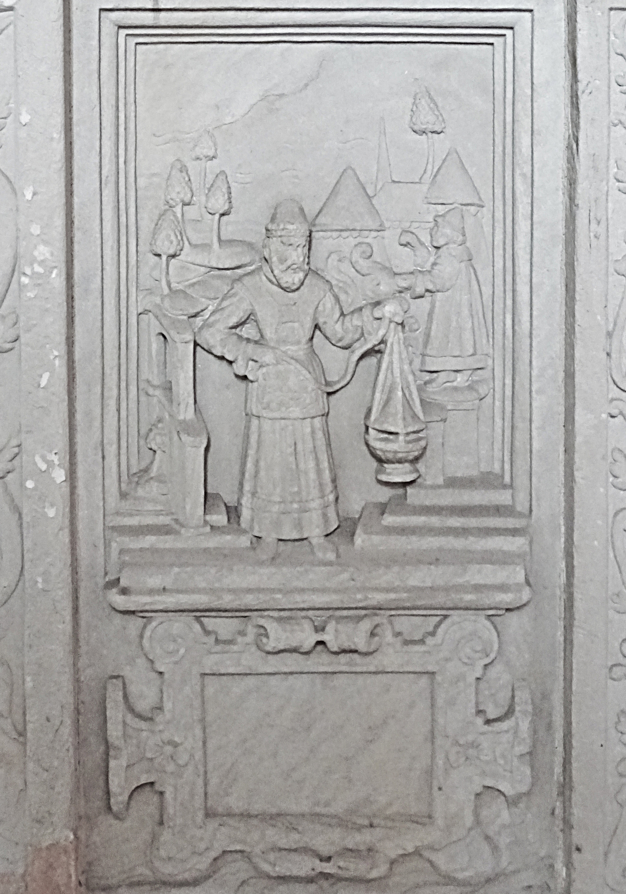 Steinbilderbibel in der St. Annenkirche (Eisleben), 17/29, Aaron als Hohepriester